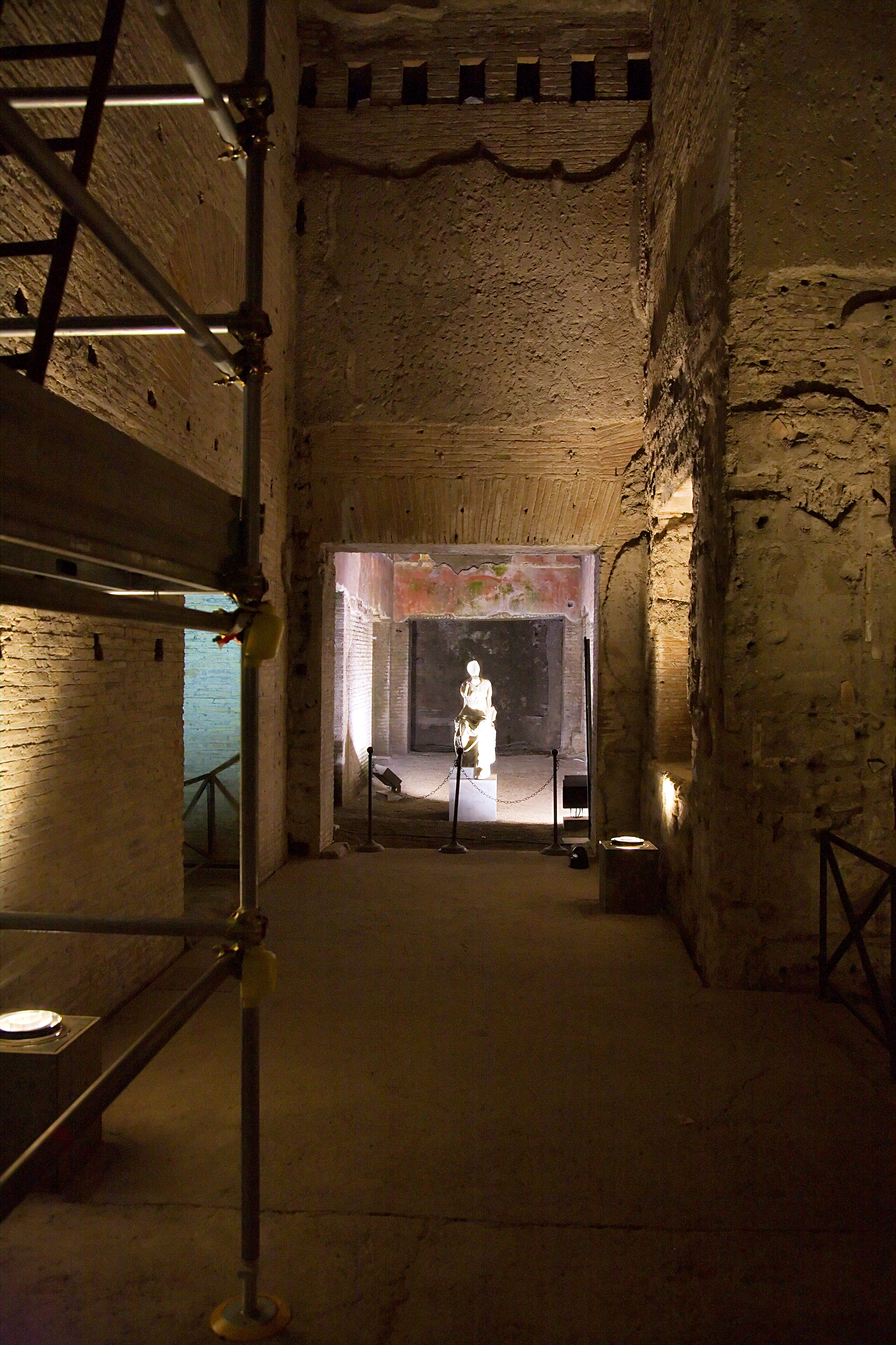 Vestiges de la Domus Aurea de Rome.